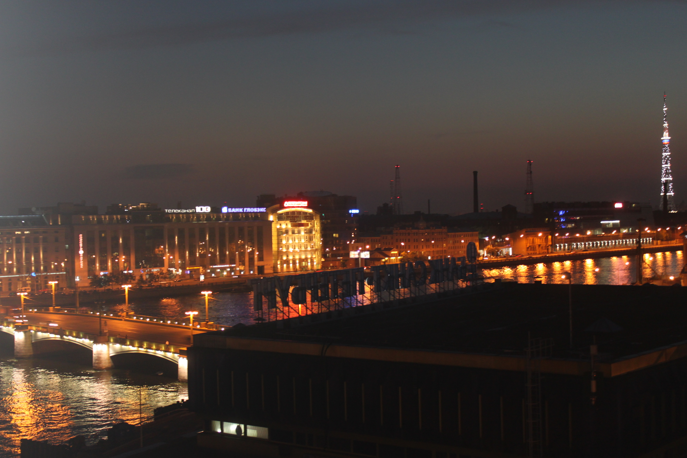 Санкт-Петербург, Сампсониевский мост